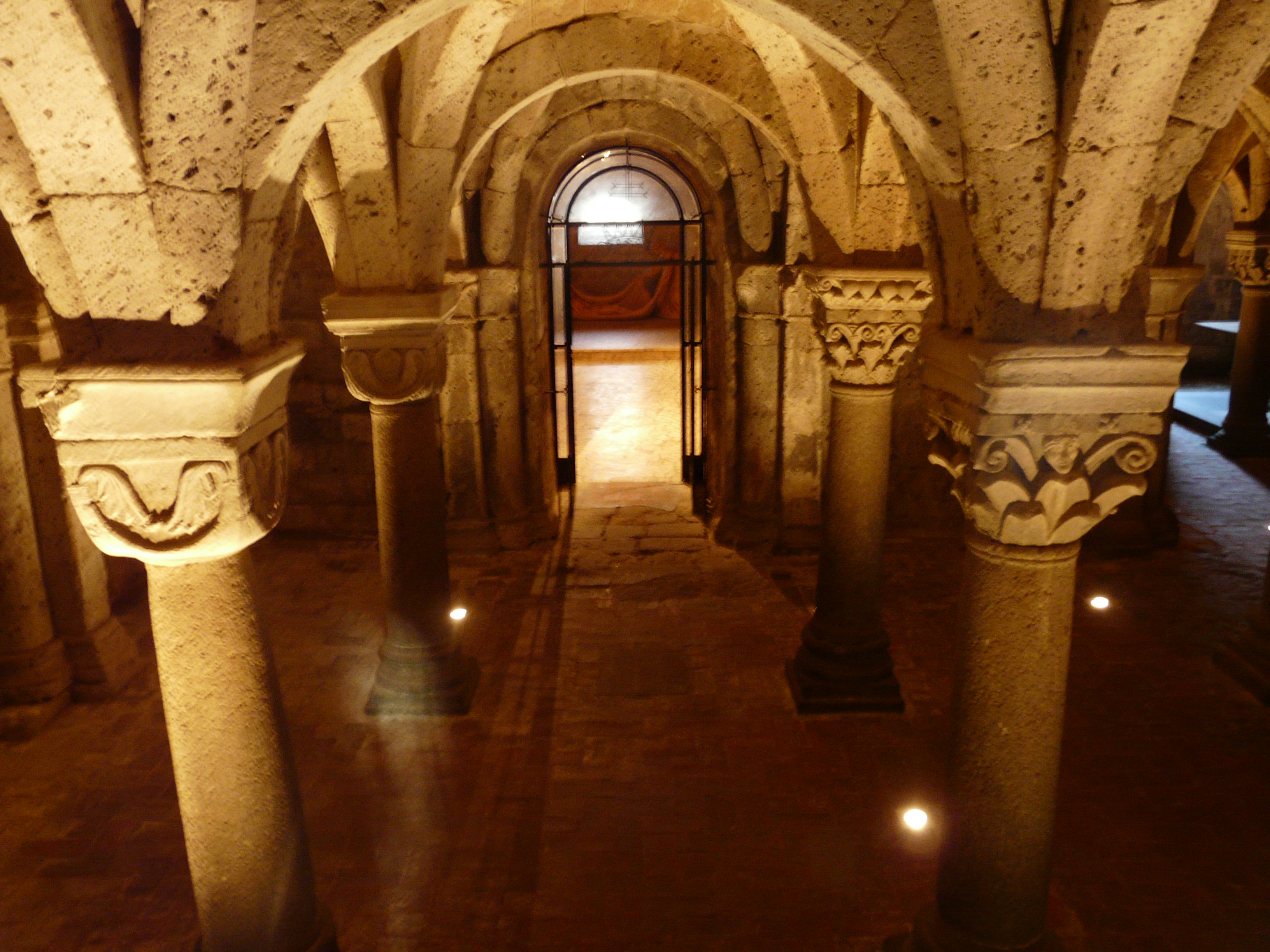 Cripta della Basilica di San Sepolcro, Acquapendente, Lazio, Italia